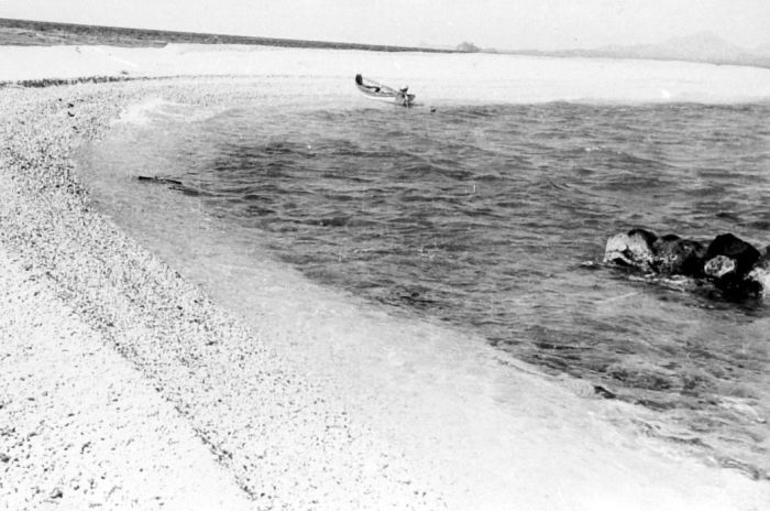 Negatief. Een koraalzandplaat op het eiland Noko